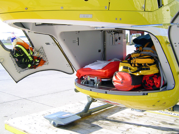 Das Heck der EC-135 mit der Trage für den Krankentransport und diverser Alpinausrüstung